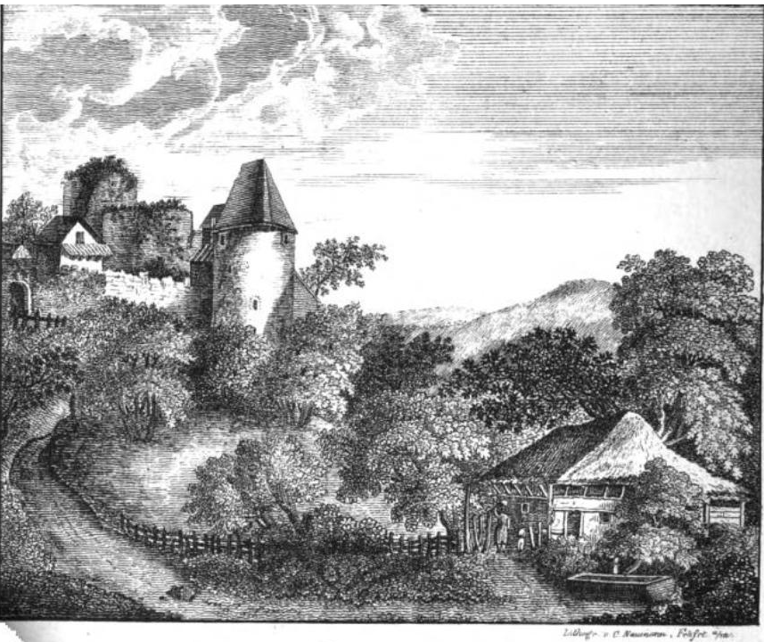 Stich der Trostburg (AG)